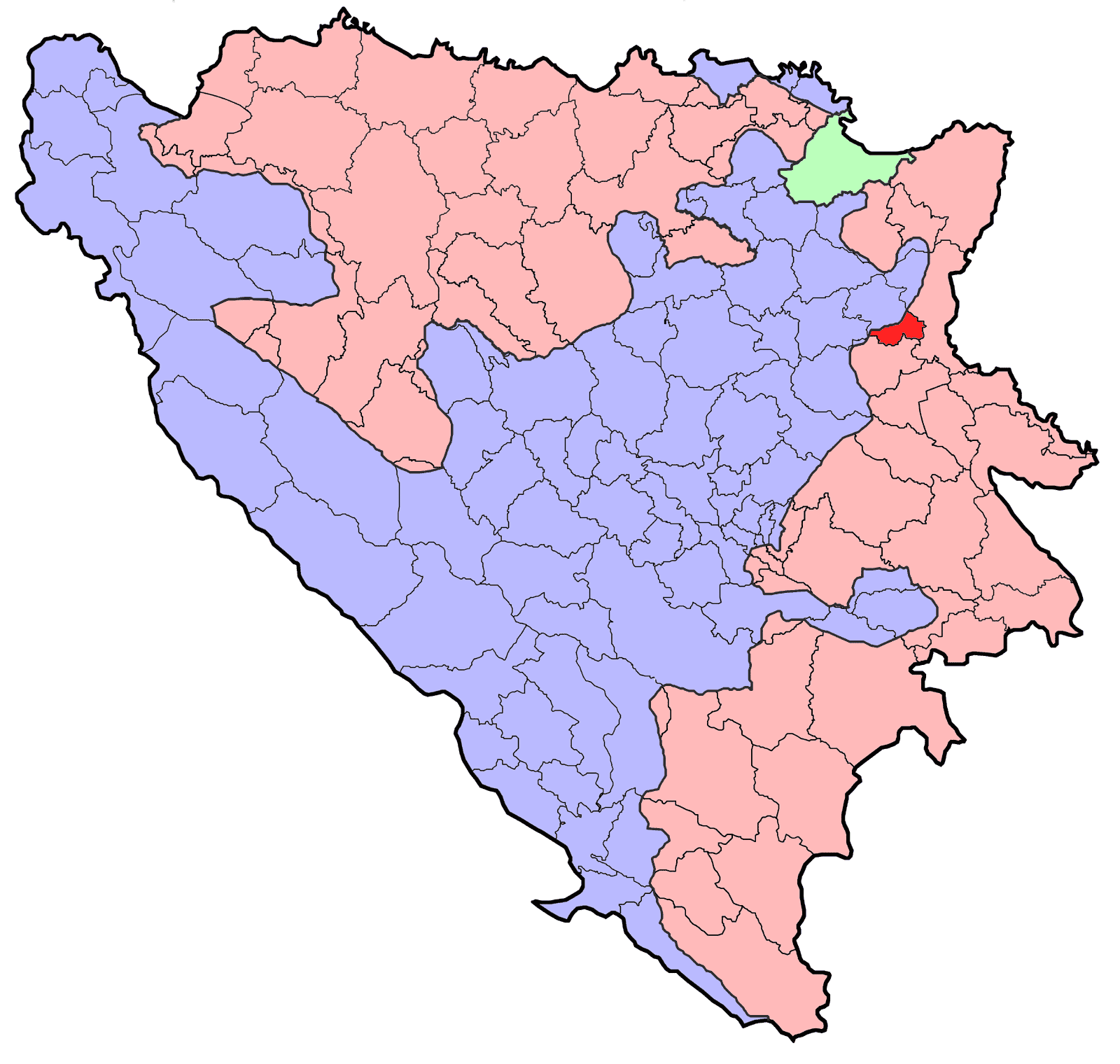 Republika Srpska (BiH) municipality